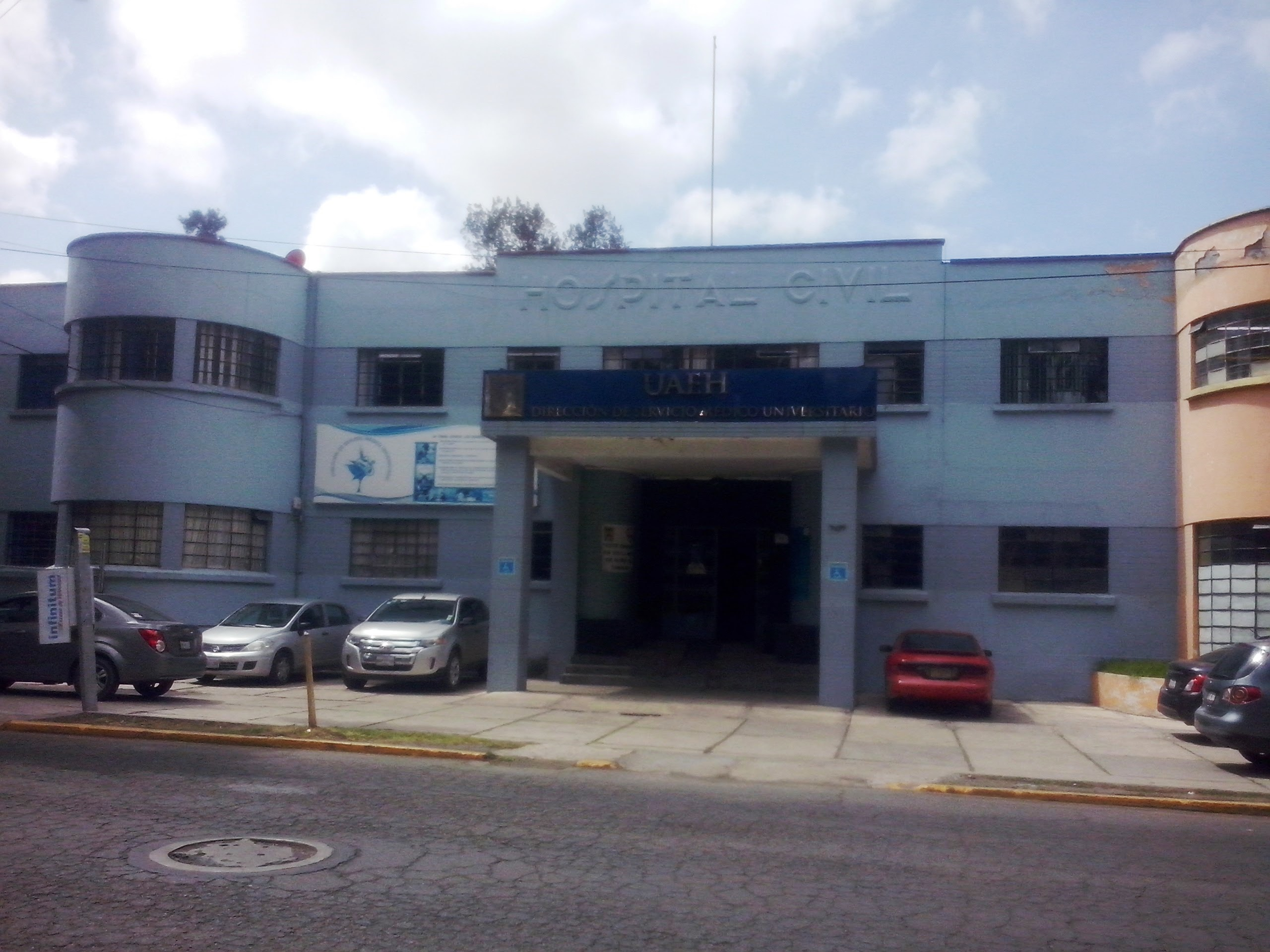 Ex Hospital Civil, Pachuca